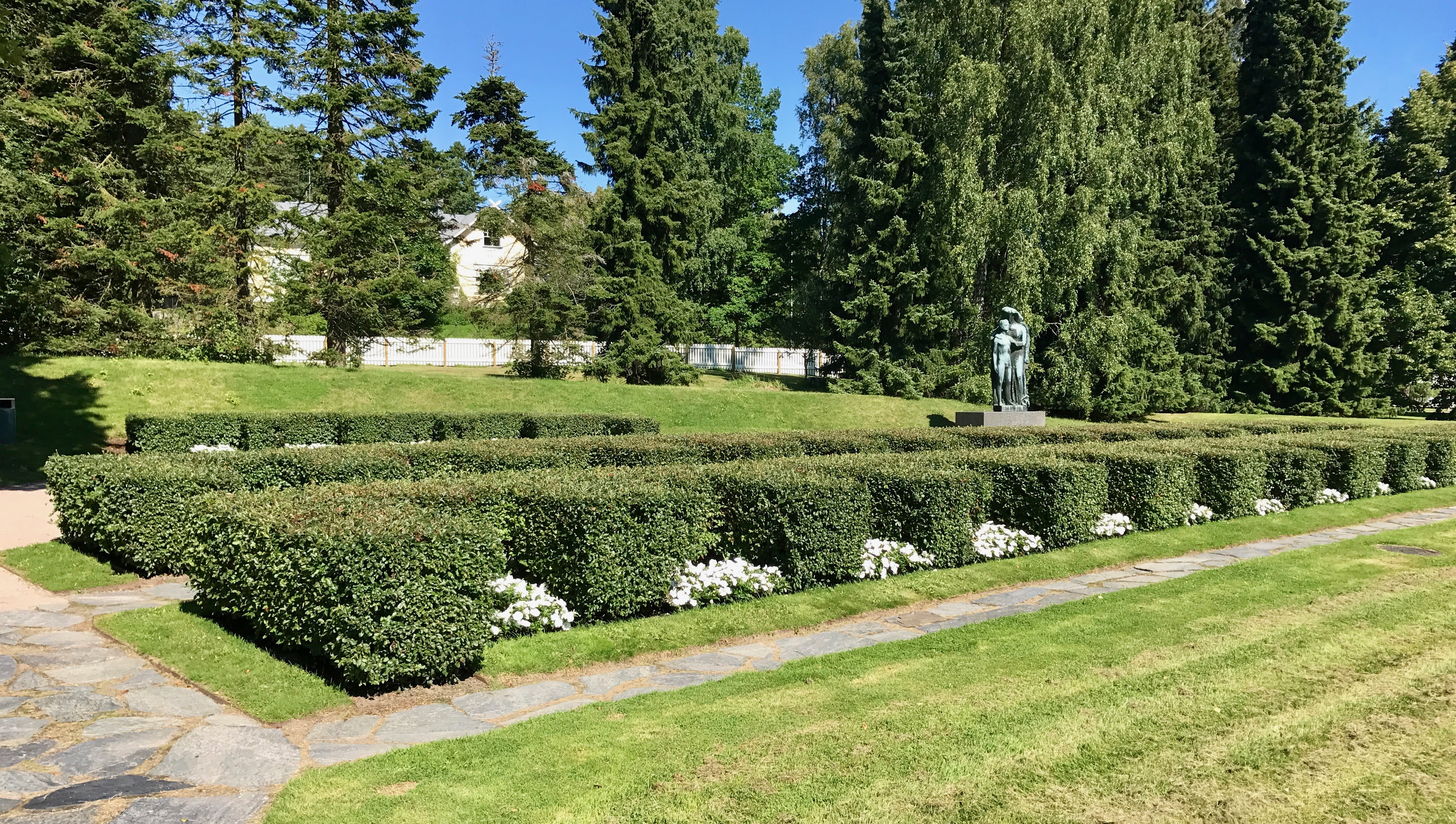 Munkkiniemen sankarihautausmaa sijaitsee Helsingin Munkkiniemessä Gert Skytten puistossa.